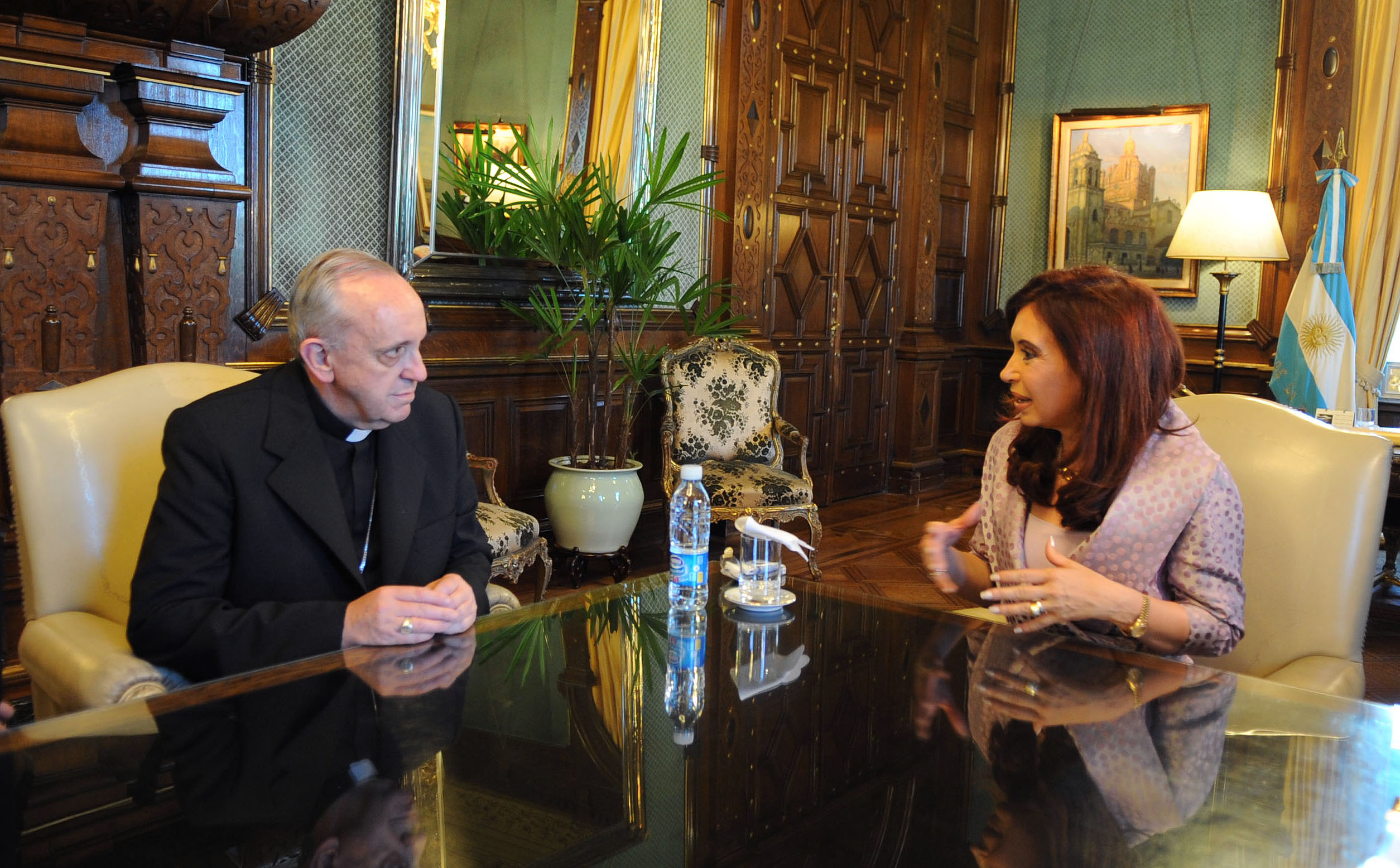 Encuentro con representantes de la Iglesia argentina